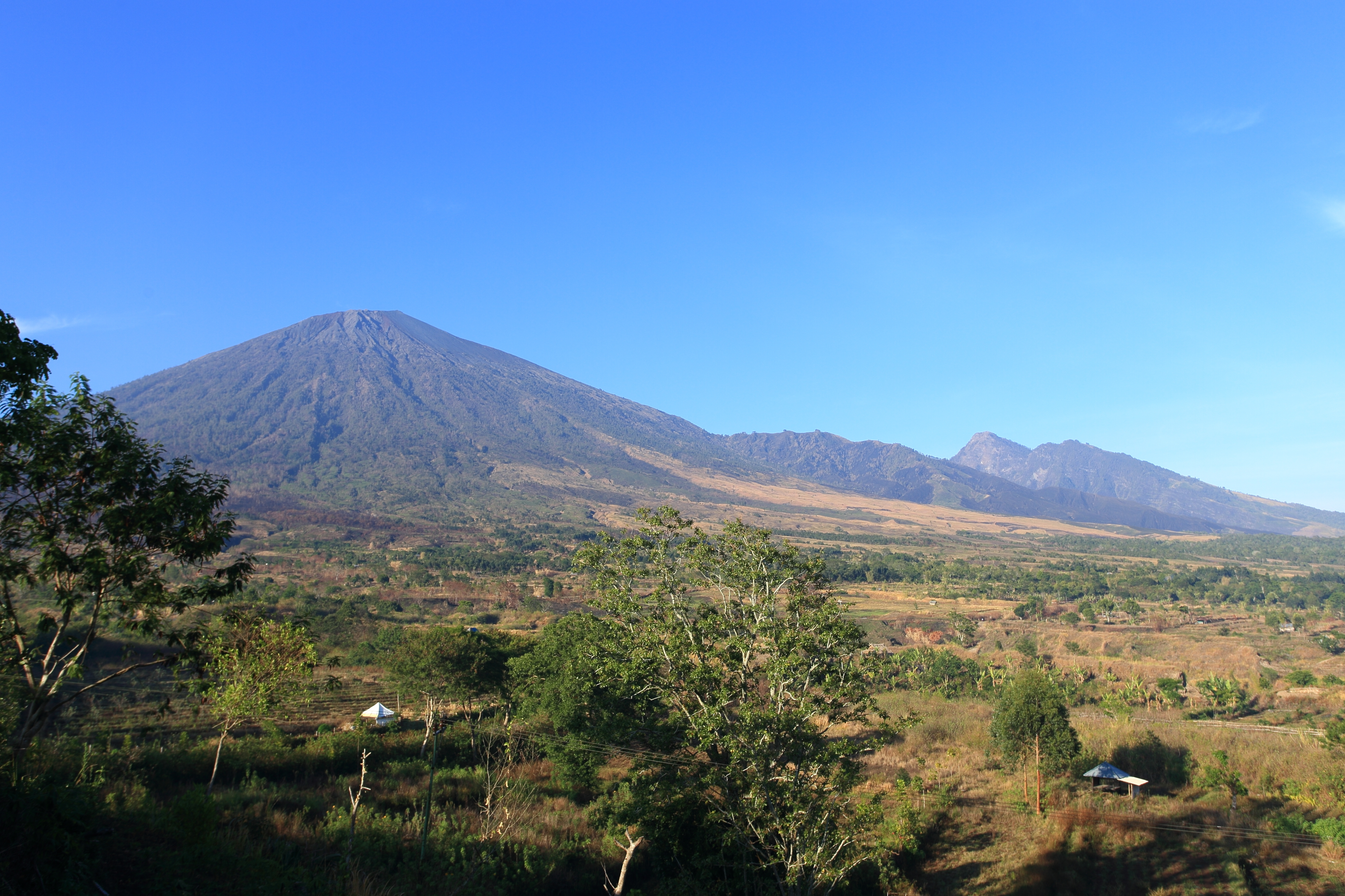 Mount Rinjani in Indonesia